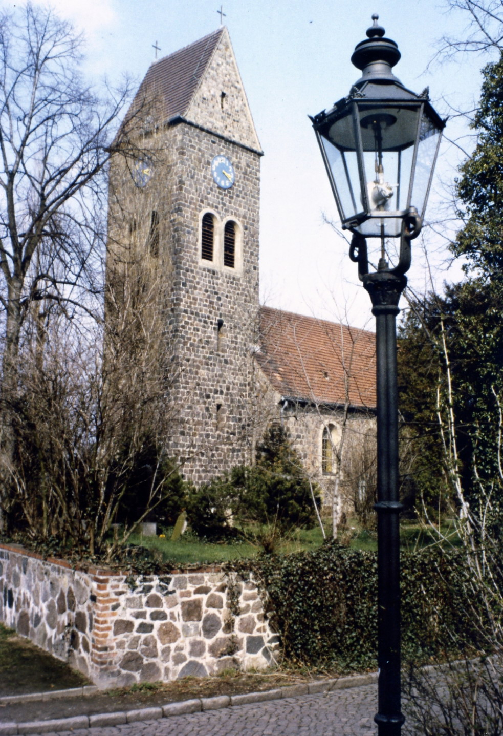 Dorfkirche Lichtenrade, von Südwesten gesehen